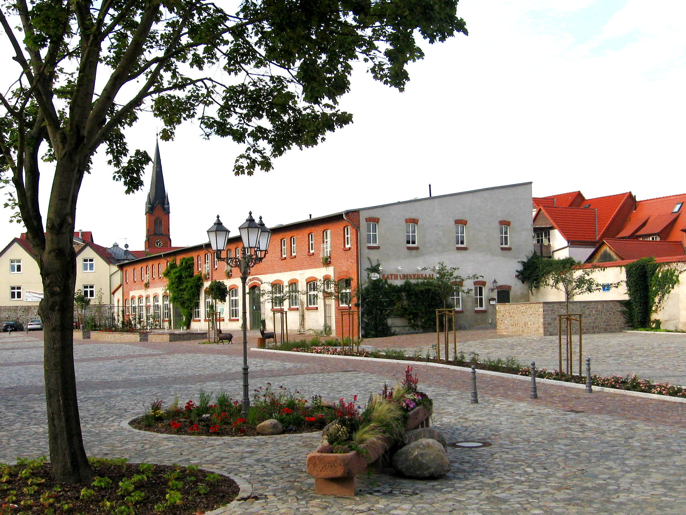 Schloßdomäne